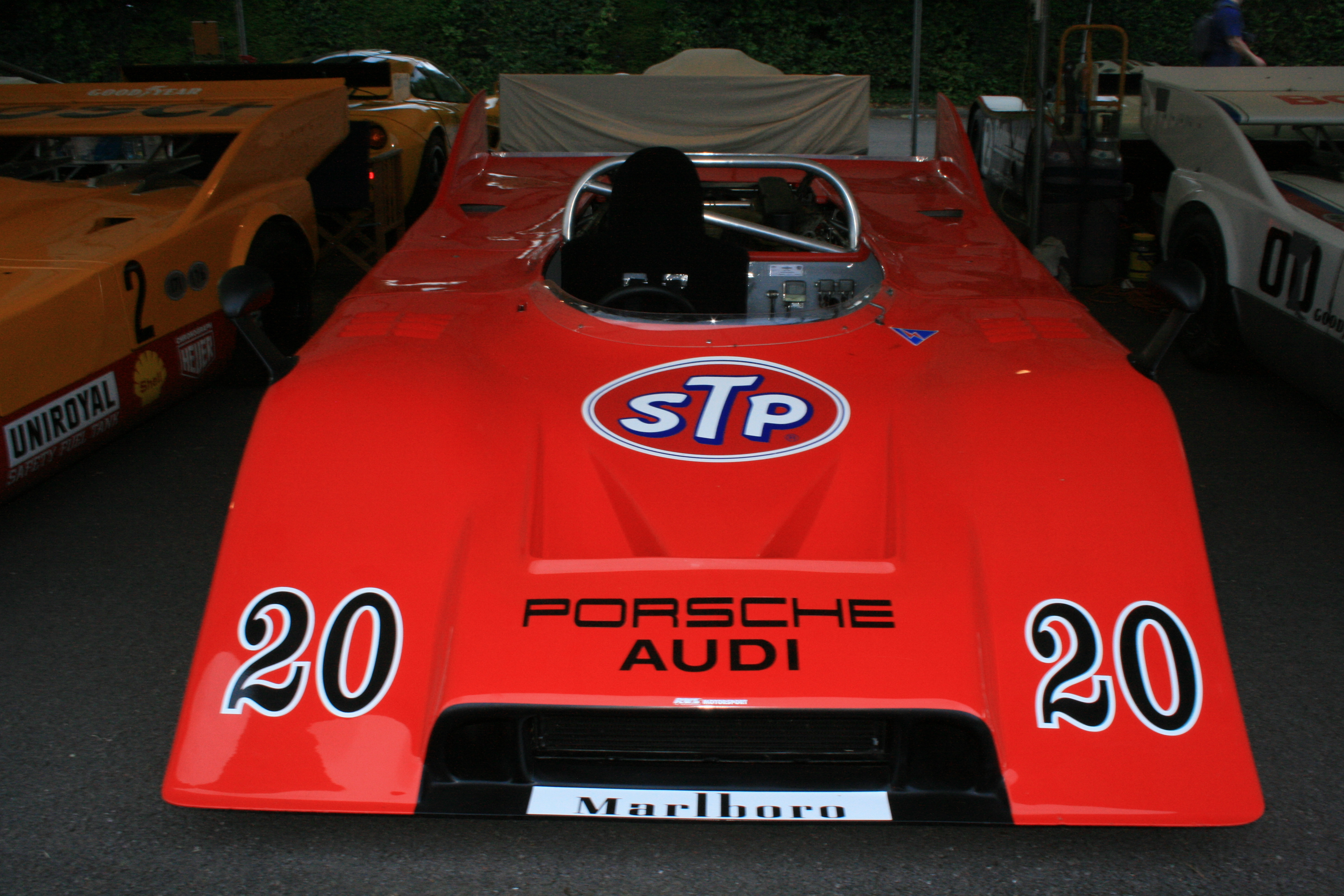 Porsche 917/10 CanAm ex-Joseph Siffert